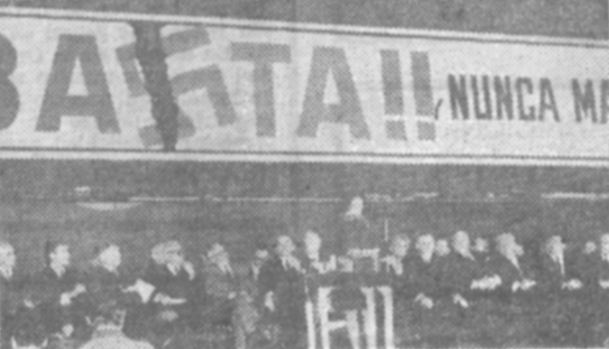 Acto conmemorativo del 25° aniversario del levantamiento del Ghetto de Varsovia realizado en el estadio Luna Park de la Ciudad de Buenos Aires